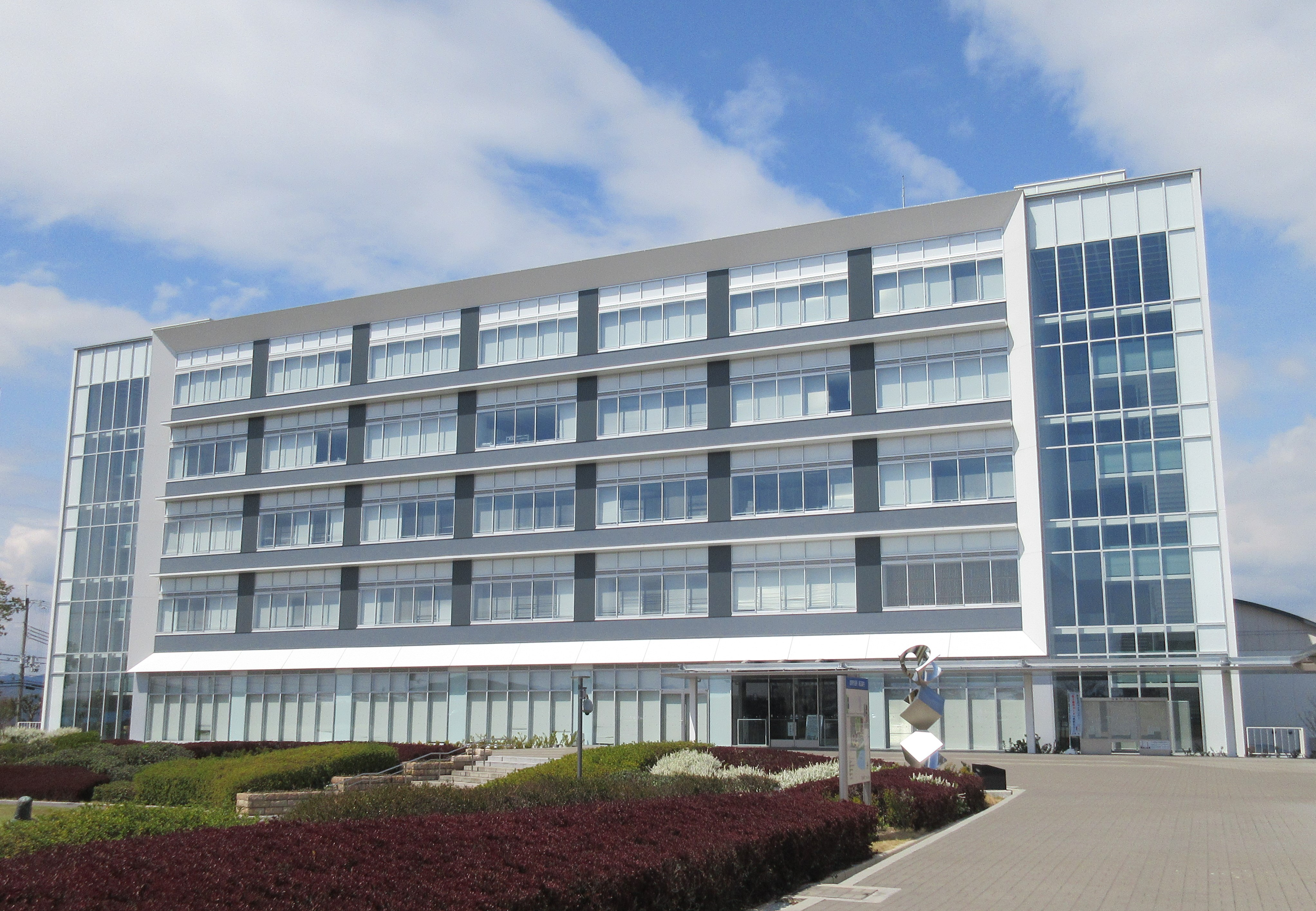 加東市役所